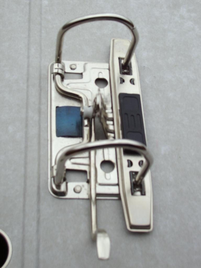 Exentermechanik eines Aktenordners Status: GNU